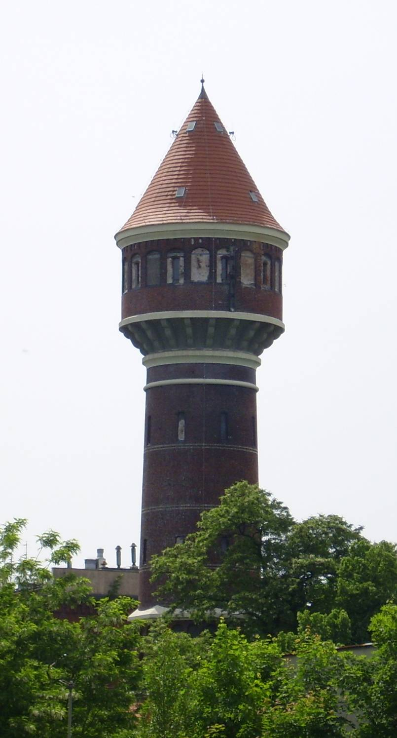 Wrocław-Brochów. Wieża ciśnień. 02.2000.